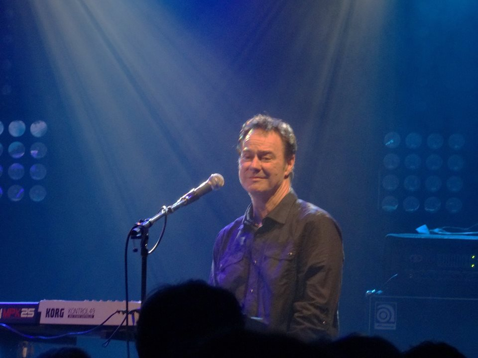 Peter Kingsbery en concert à Vauréal le 10/02/2015